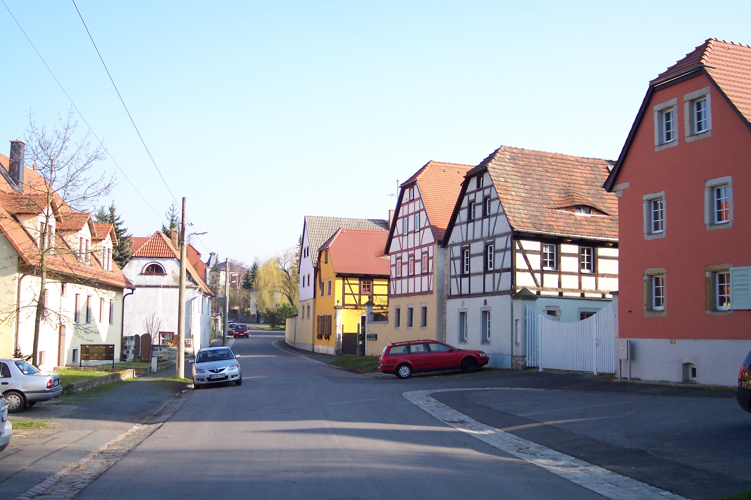 Häuser im alten Ortskern von Coschütz in Dresden